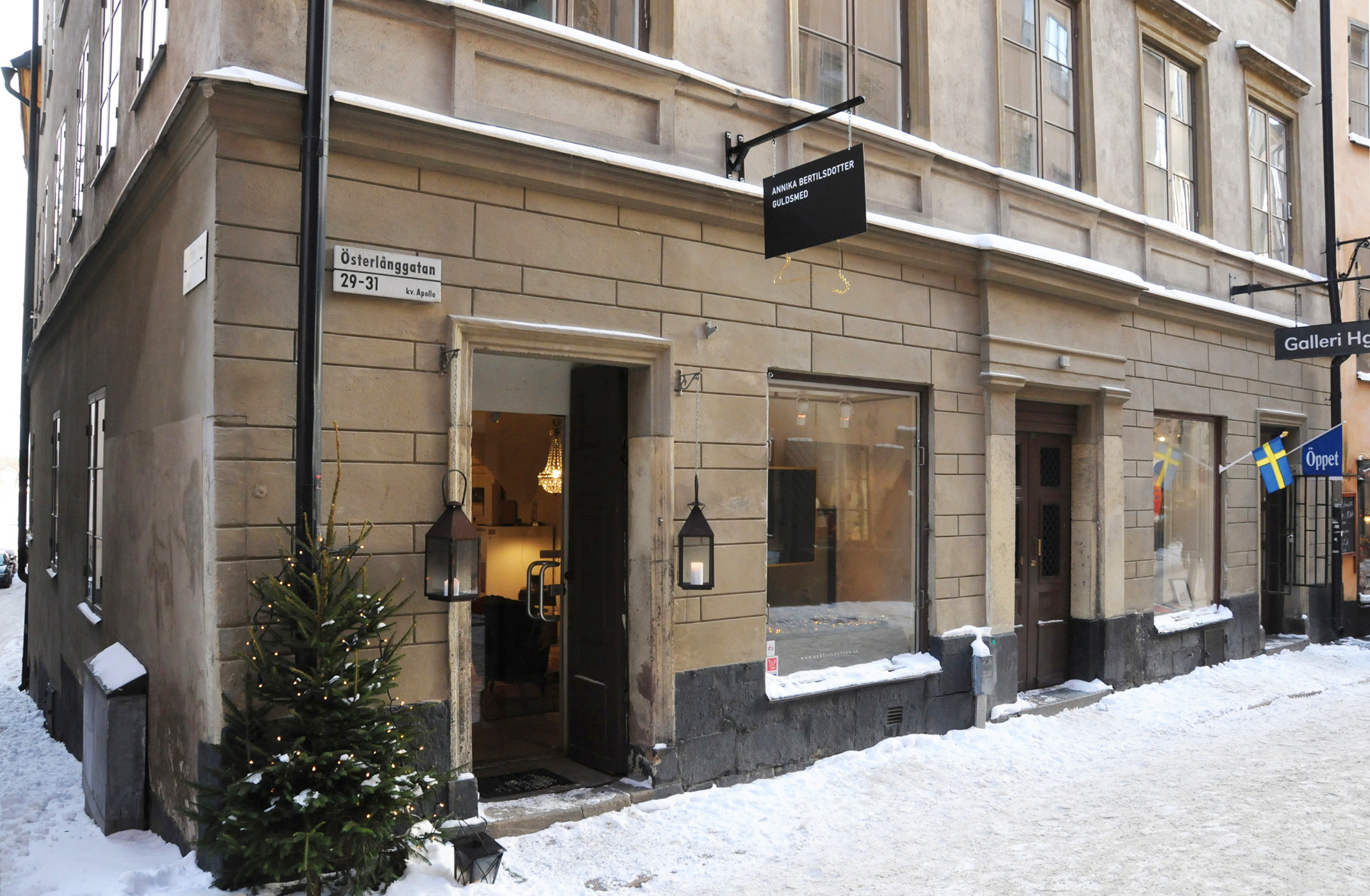 Österlånggatan 29. I detta hus låg år 1782 källaren Sveriges Vapen. Mellan den 23 november och den 31 december 1782 bodde den blivande amerikanske presidenten John Quincy Adams (1767-1848) på Sveriges Vapen.